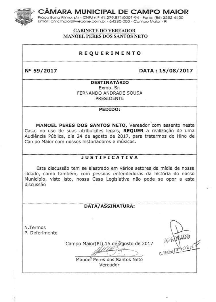 Requerimento da Câmara Municipal de Campo Maior sobre a questão de suposto plágio no hino municipal de Campo Maior.